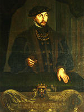 Портрет Энно I (1460-1491), графа Восточной Фрисландии с 1480 по 1491